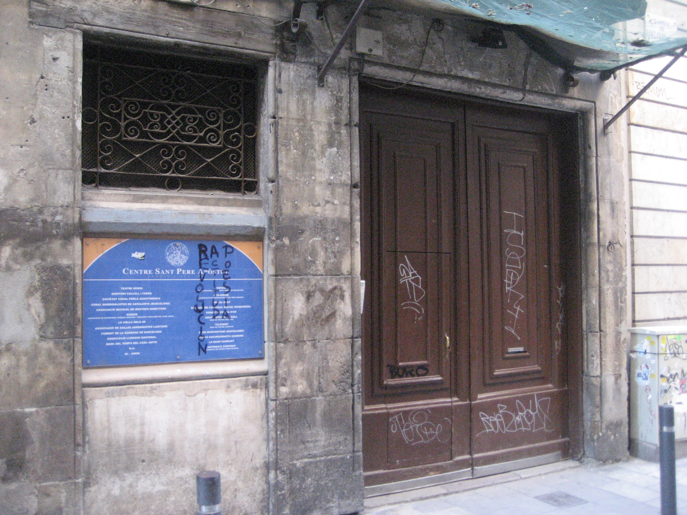 Centre de Sant Pere Apòstol. Porta d'entrada al teatre i a l'entitat (juliol, 2009)